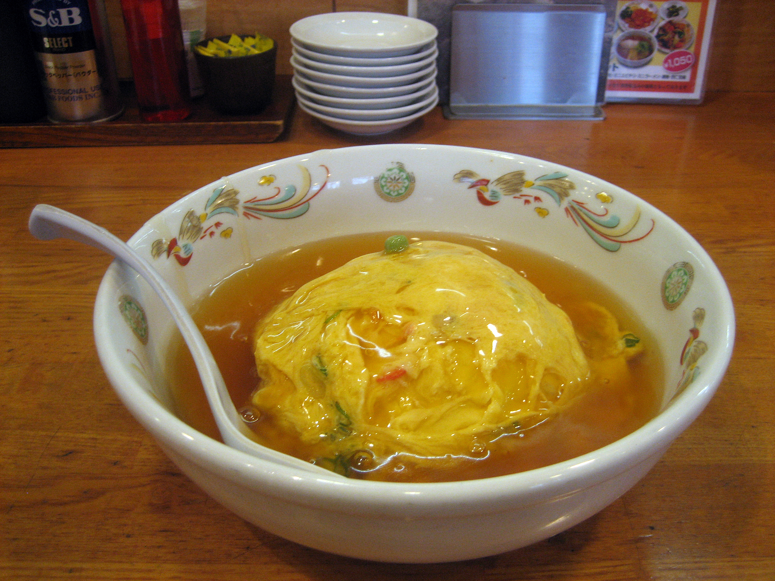 主に姫路市内の店舗の画像。そして飲食物。 京都餃子の王将の1人分の天津飯。